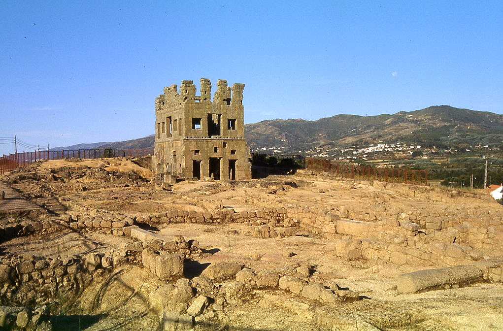 Yacimiento arqueológico romano de Centum Cellas, en las cercanías de Belmonte (Portugal). Original en diapositiva de 35 mm. tomada en septiembre de 2003.